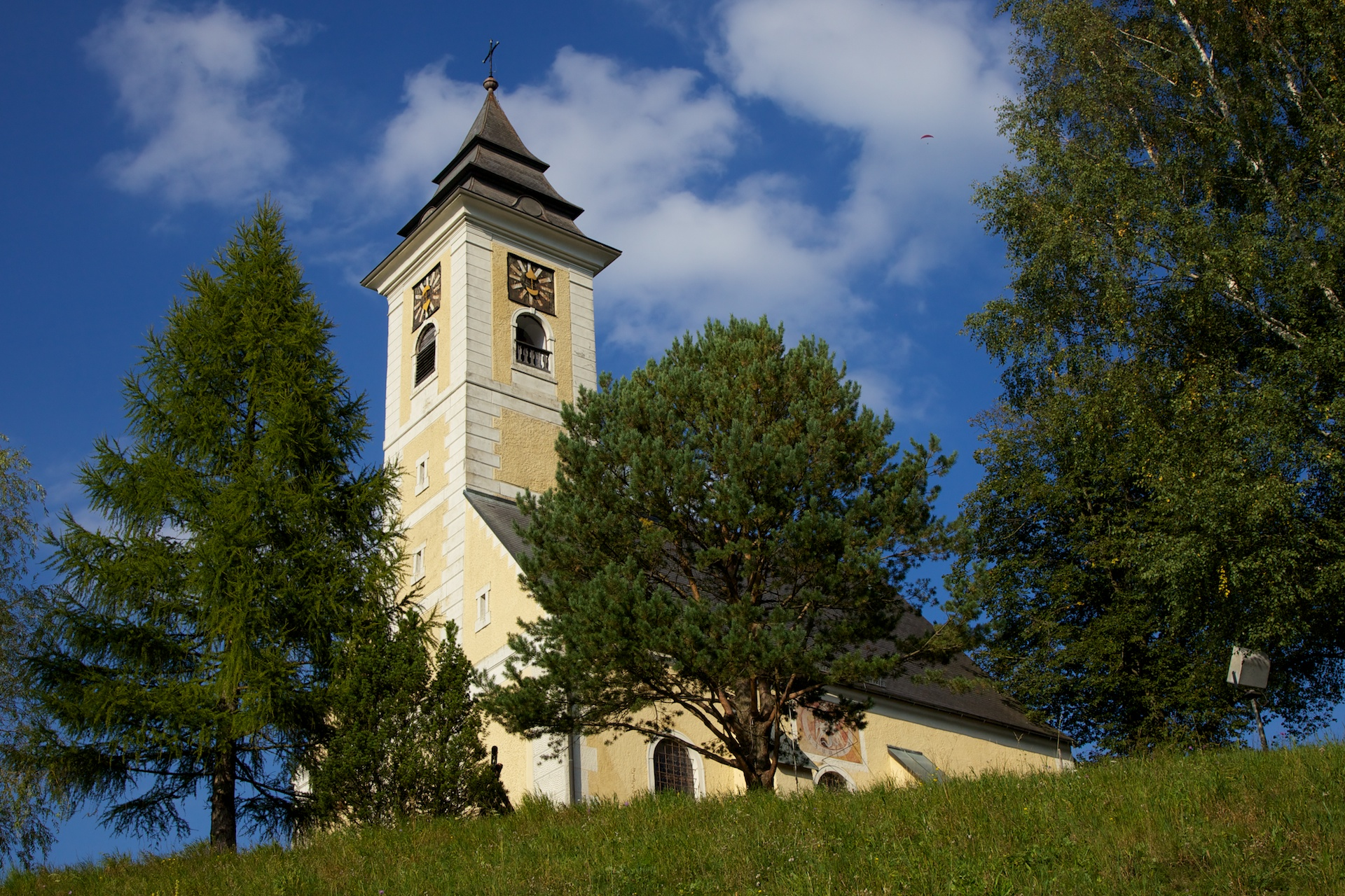 Kalvarienbergkirche hl. Georg